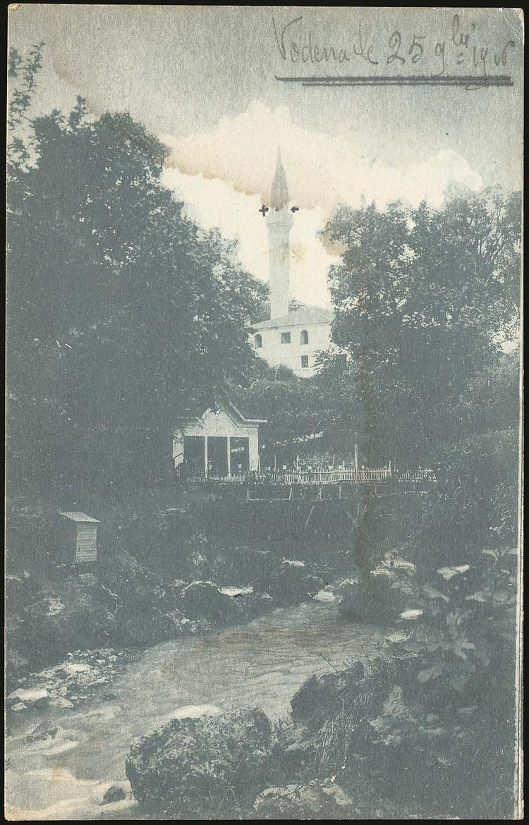 Джамия във Воден в 1906 година. Османска пощенска картичка